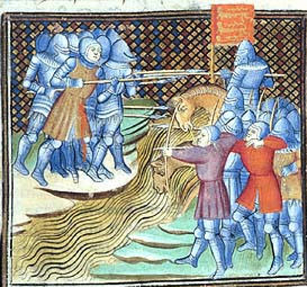 Bitva u Blanchetaque 1346